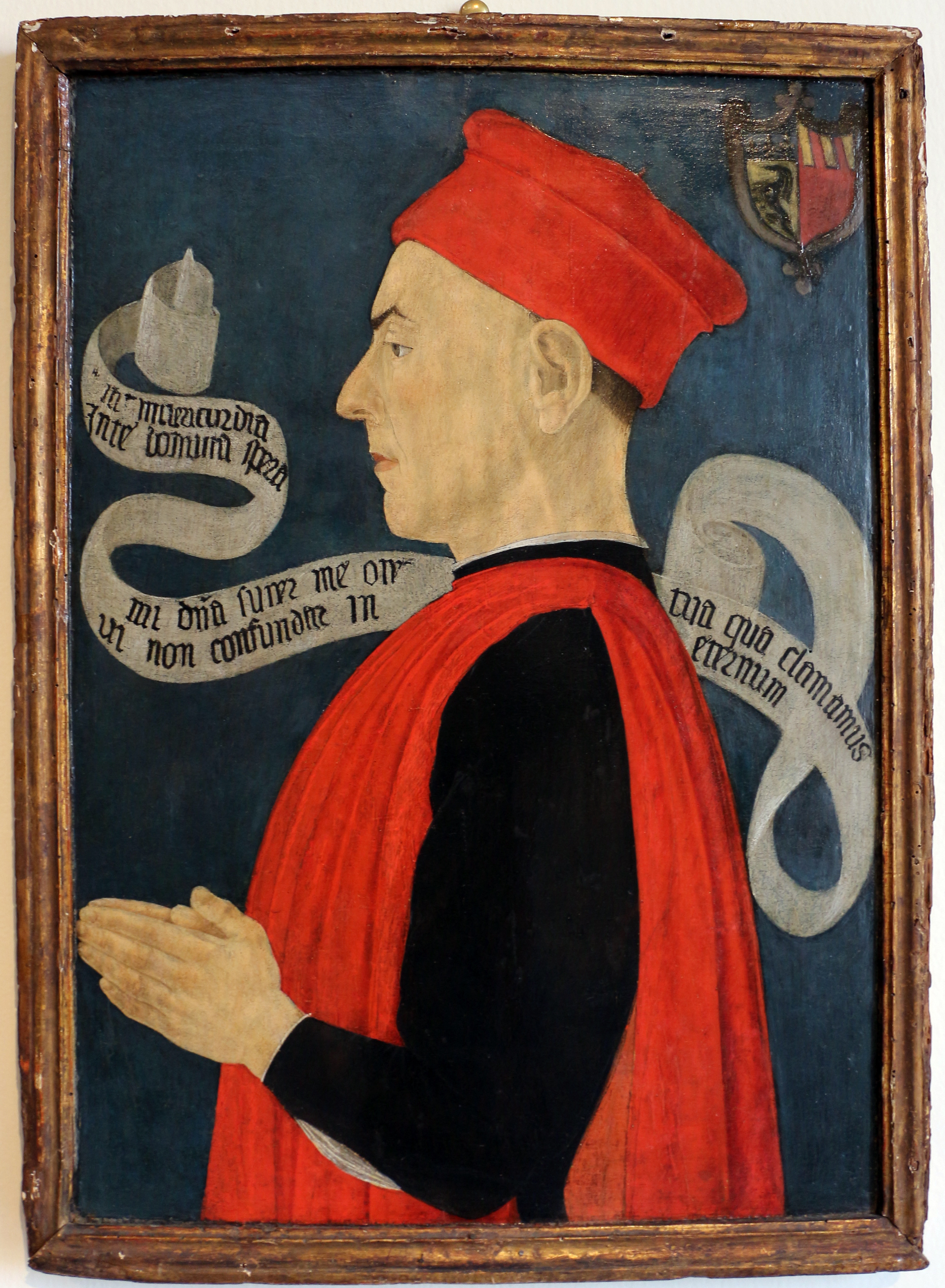 Pinacoteca Nazionale di Bologna This is a photo of a monument which is part of cultural heritage of Italy.